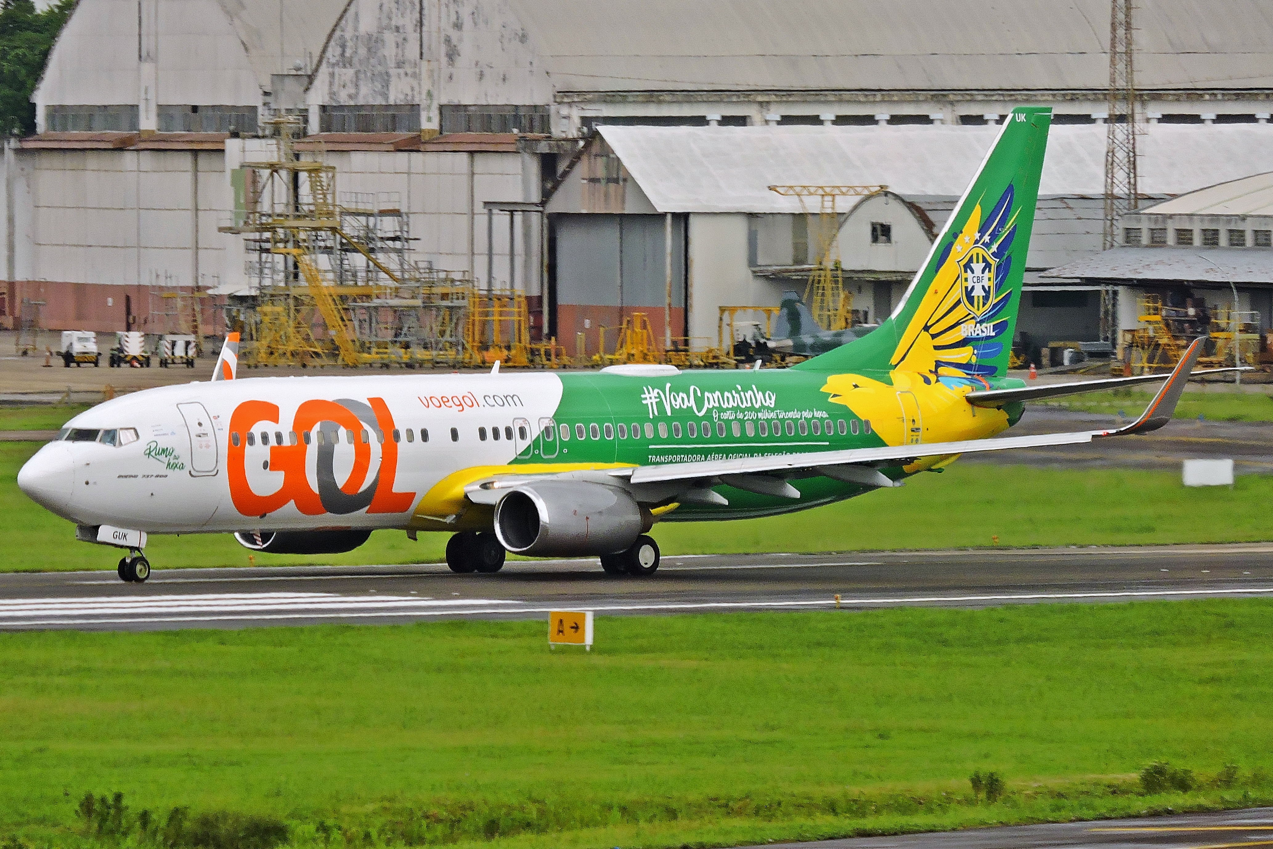 737-800 GOL SBPA